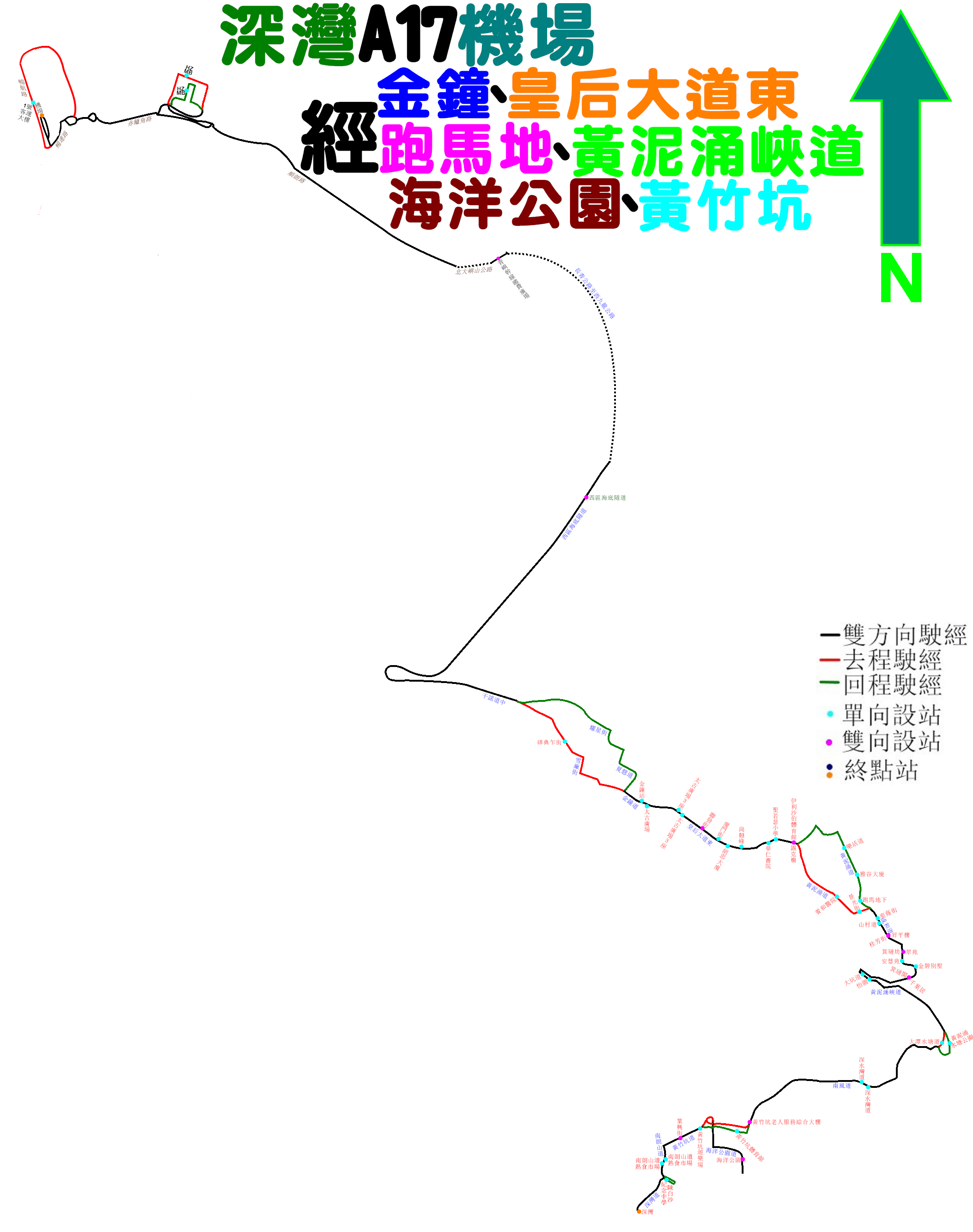 城巴機場快線A17線的走線圖